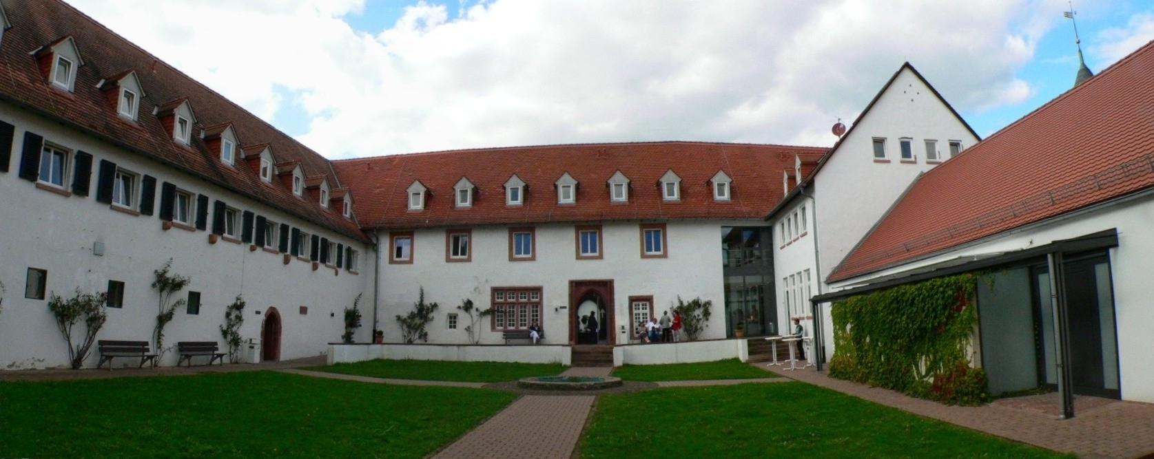 Kloster Höchst im Odenwald (Deutschland): Stiller Hof mit Konventbau, Refektorium und Aula